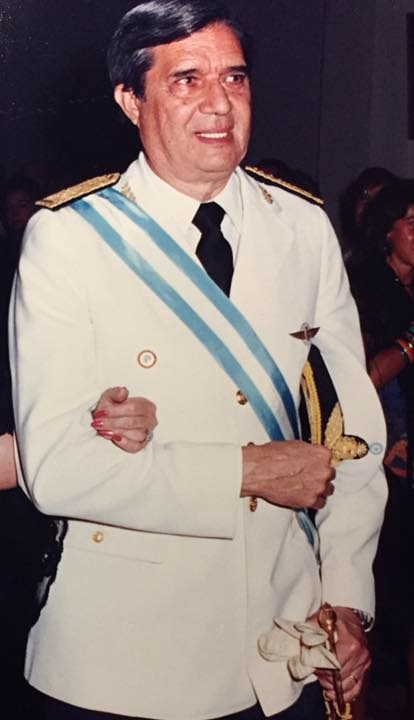 Basilio Lami Dozo, tras asumir como Comandante en Jefe de la Fuerza Aérea Argentina